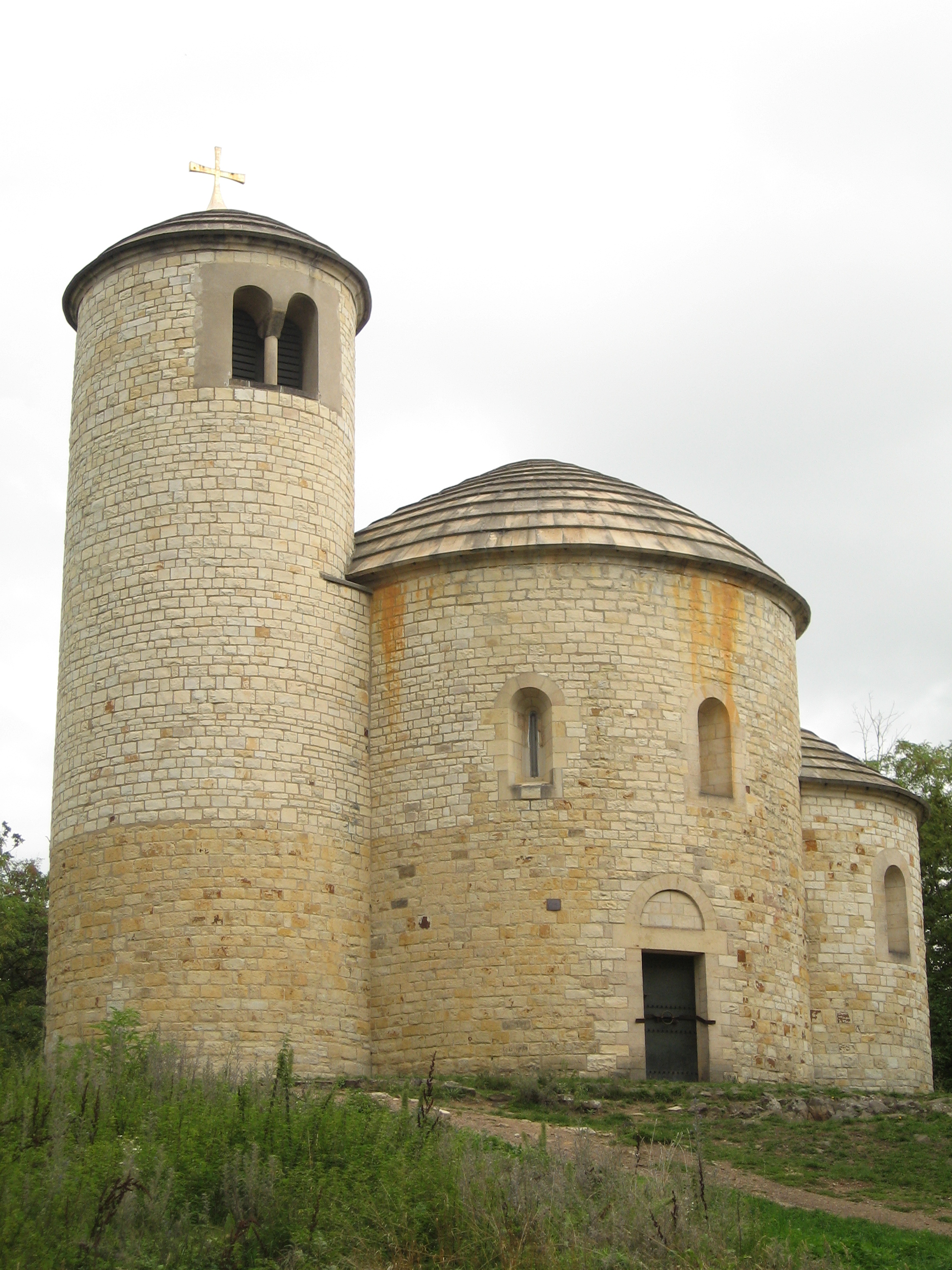 Rotunda sv. Jiří na hoře Říp